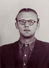 Vazební fotografie Josefa Charváta (zdroj: ABS).